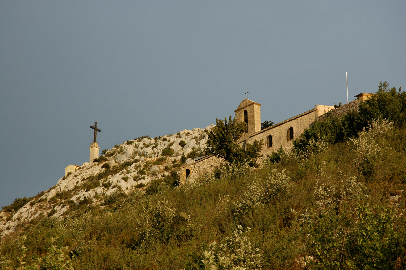 Versant nord de la montagne Sainte Victoire. Le Prieuré et la croix de Provence .